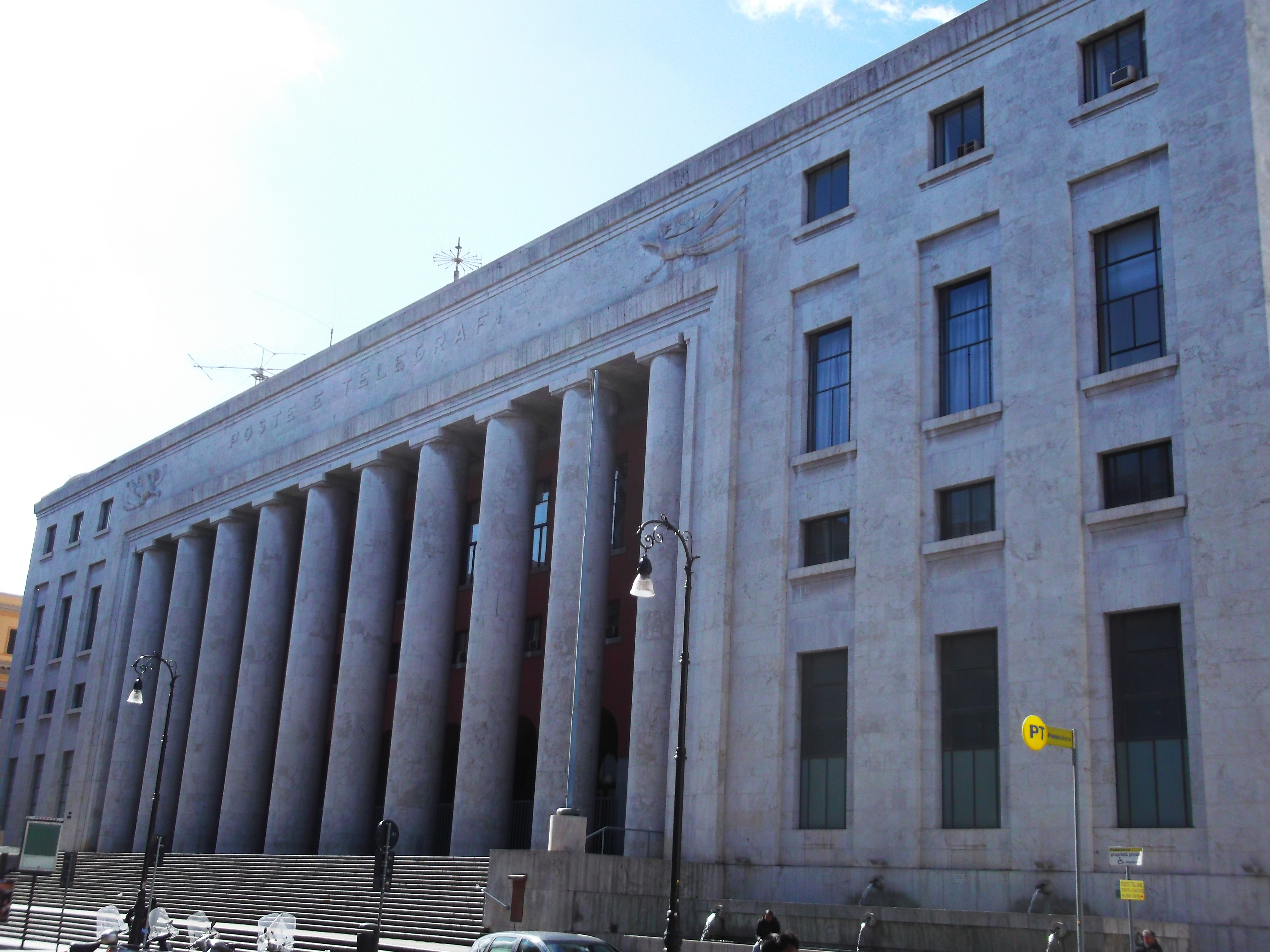 Facciata